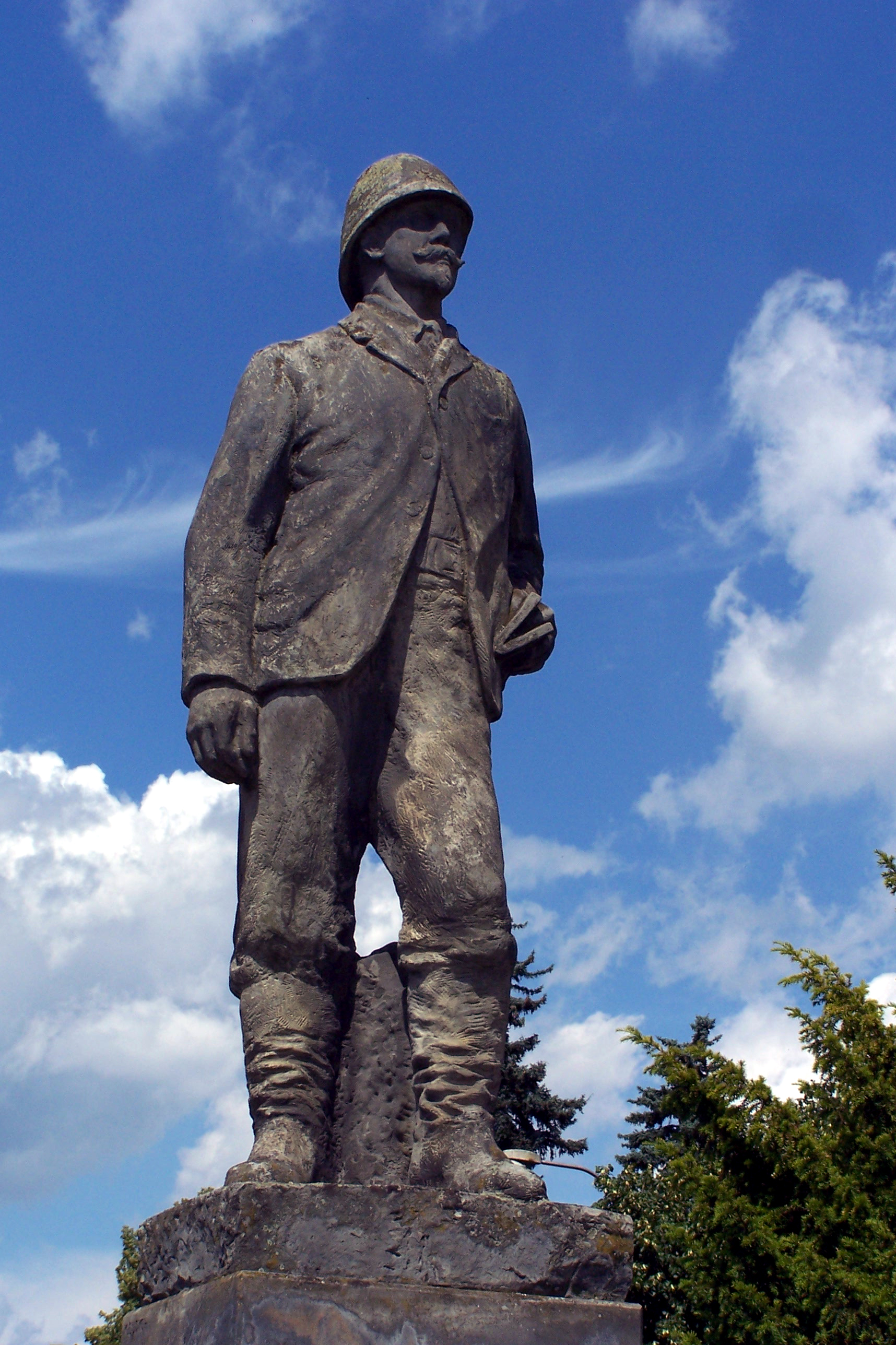 Pomník Emila Holuba v Holicích. Pomník je dílem sochaře Jindřicha Soukupa z roku 1949.